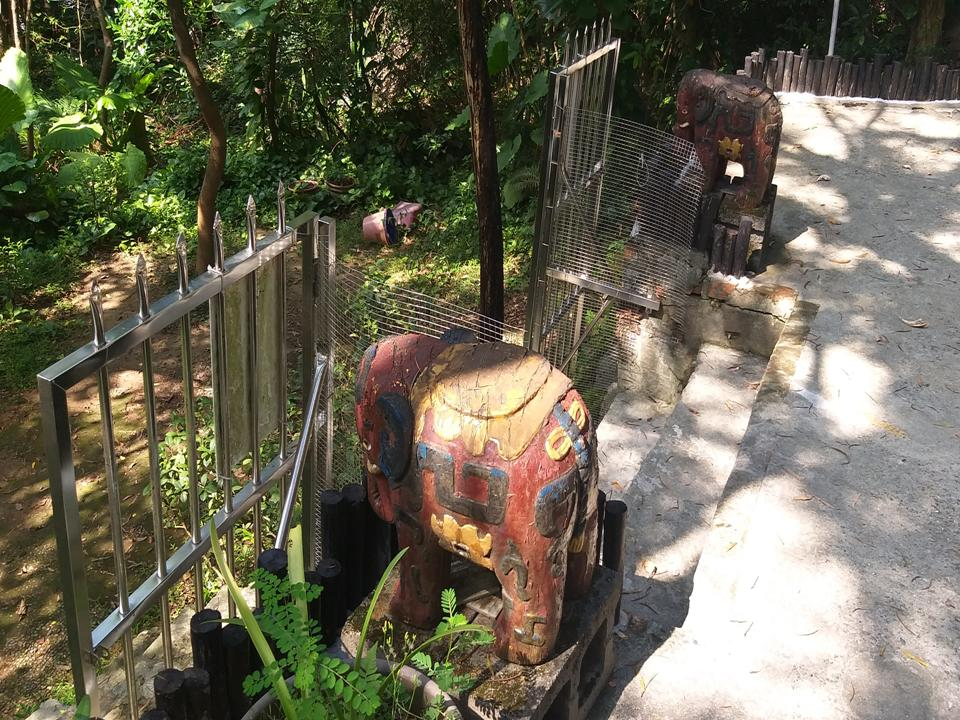 中文（台灣）: 章嘉活佛在藏傳佛教史具有崇高地位，且為佛教界重要之領導人物，是西藏黃教格魯派之活佛中，自1949年後唯一來臺定居者，對於推動藏傳佛教在臺發展與安定當時人心有顯著貢獻。造型具藏式舍利塔之重要特徵，包括塔剎、瓶形塔身及基座等三段式造型，極富特色與稀有性，具歷史建築保存價值。 1290391,121.5032476 中和禪寺後方山坡